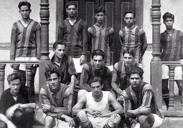 Primer equipo de L.D. Alajuelense campeón de Primera División de Costa Rica (1928), tambien fue el primer campeón de Copa en 1926. De pie, de izquierda a derecha: Franklin Mórux, Enrique Quique Solera, Alejandro Morera, Carlos Torres, Salvador Soto y Jorge Oreamuno. Segunda Fila, de Izquierda a derecha: Jorge Luis Solera, Hernán Bolaños y Jorge Padilla. Primera Fila: Rodolfo Castaing, Carlos Alberto Beto Porras, Reinaldo Ulloa y Arturo Alfaro.